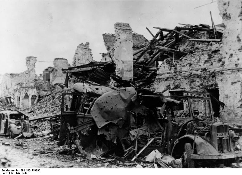 Russland, Cholm, zerstörte Fahrzeuge vor Ruinen An der Sowjetfront: Kampfstätte der Gruppe Scherer.- Zerschossene Fahrzeuge aller Art in den Ruinen der Stadt. [Sowjetunion, Cholm.- Zerstörte Fahrzeuge (u.a. MAN-Bus) vor Ruinen zerstörter Gebäude]